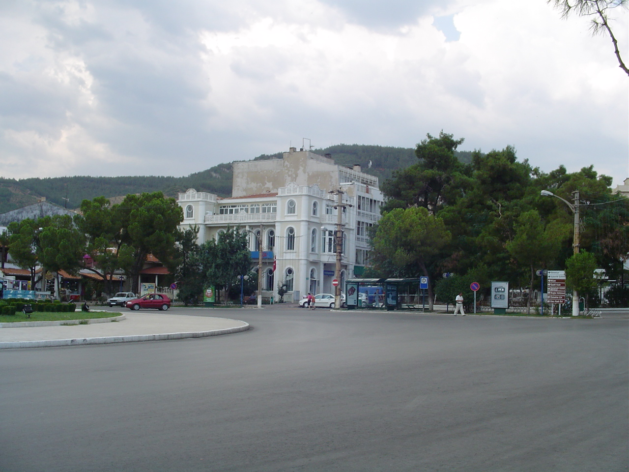 Grande place à Muğla